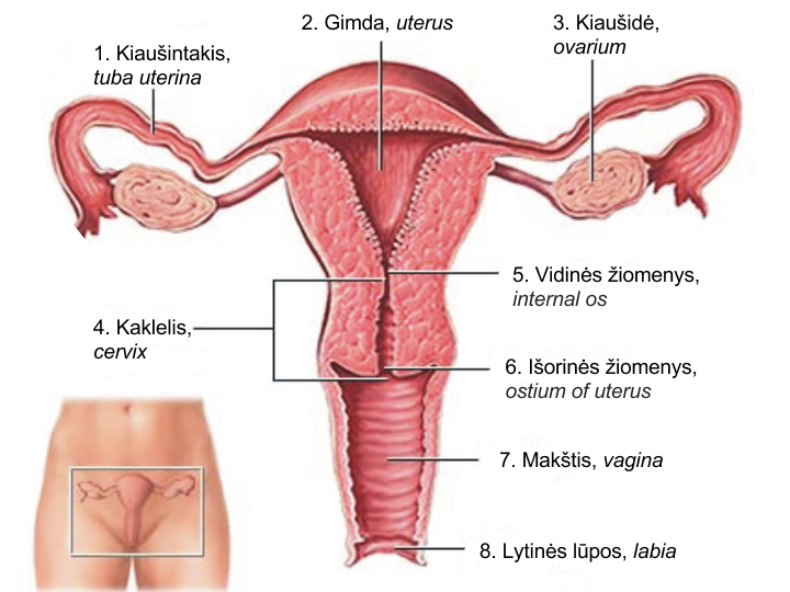 1. Kiaušintakis 2. Gimda 3. Kiaušidė 4. Kaklelis 5. Vidinės žiomenys 6. Išorinės žiomenys 7. Makštis 8. Lytinės lūpos